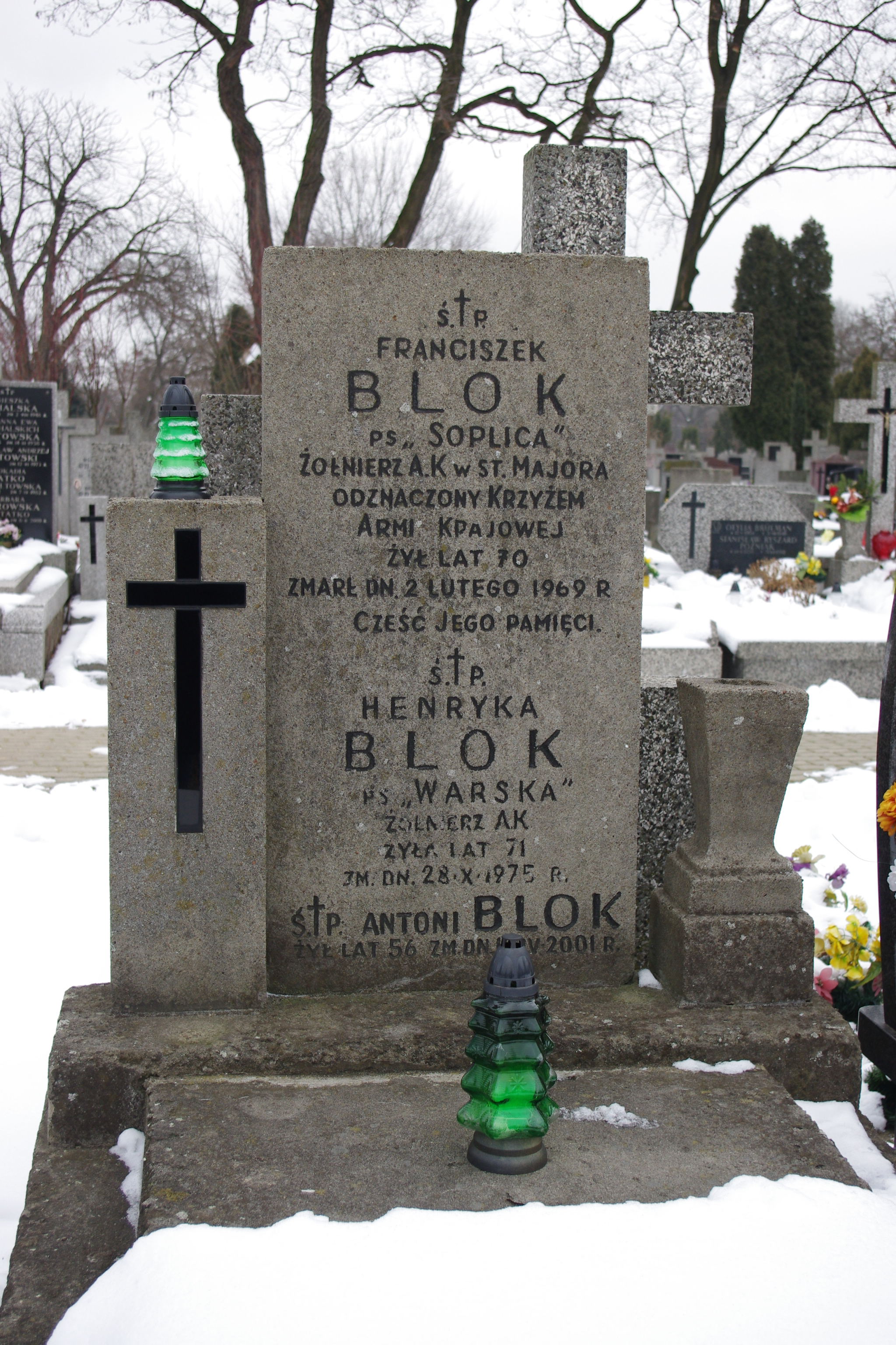 Grób majora AK - Franciszka Bloka ps. "Soplica" – współorganizatora struktur konspiracyjnych w czasie II wojny światowej na Cmentarzu Bródnowski w Warszawie